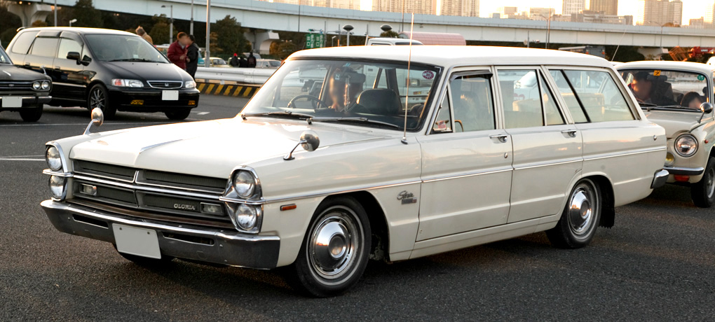 Nissan Gloria Van 2000 Deluxe 6 ( VHA30, Commercial model )